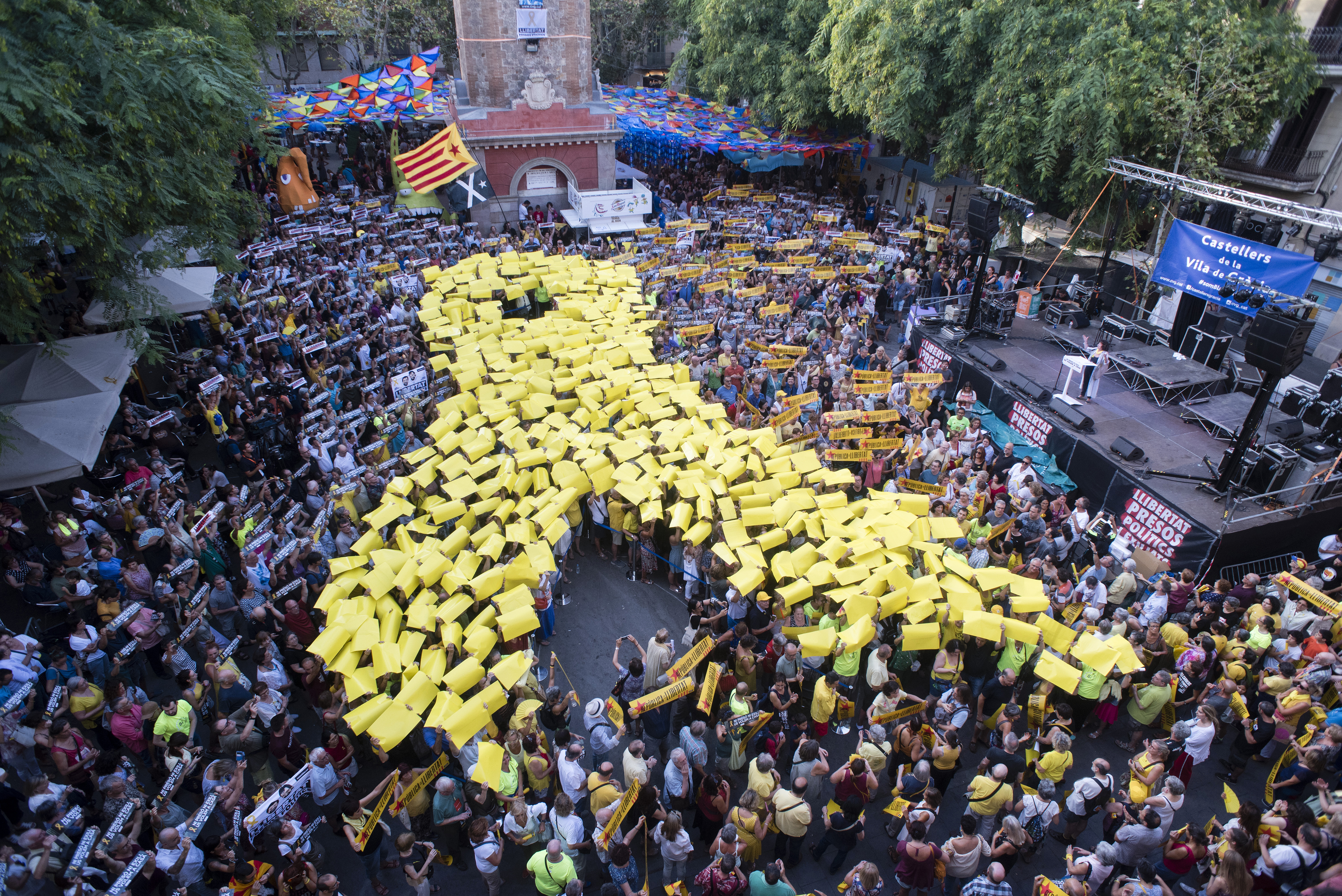 _DC87637